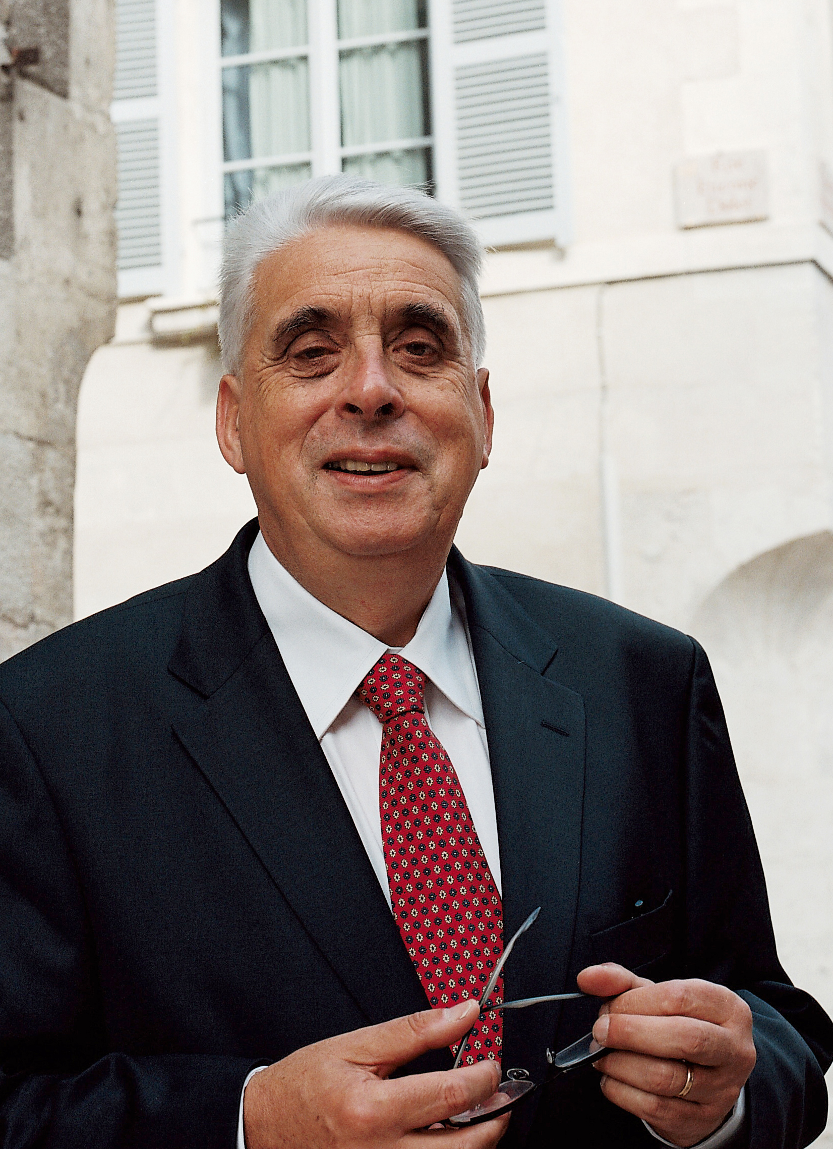 Jean-Pierre Sueur, sénateur du Loiret